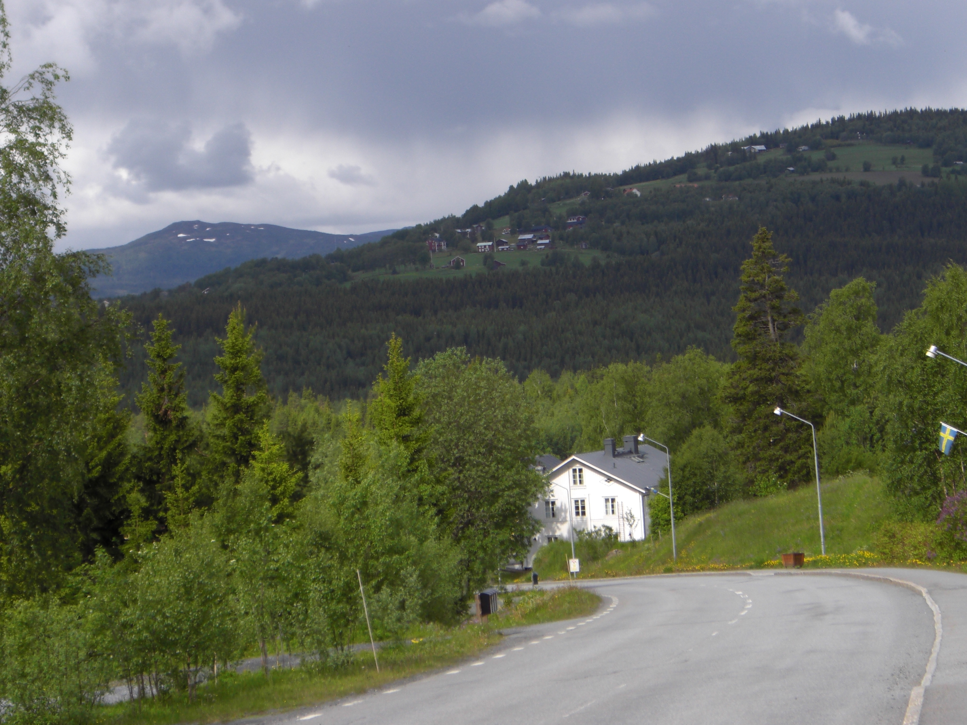 Foto från den jämtländska orten Undersåker.